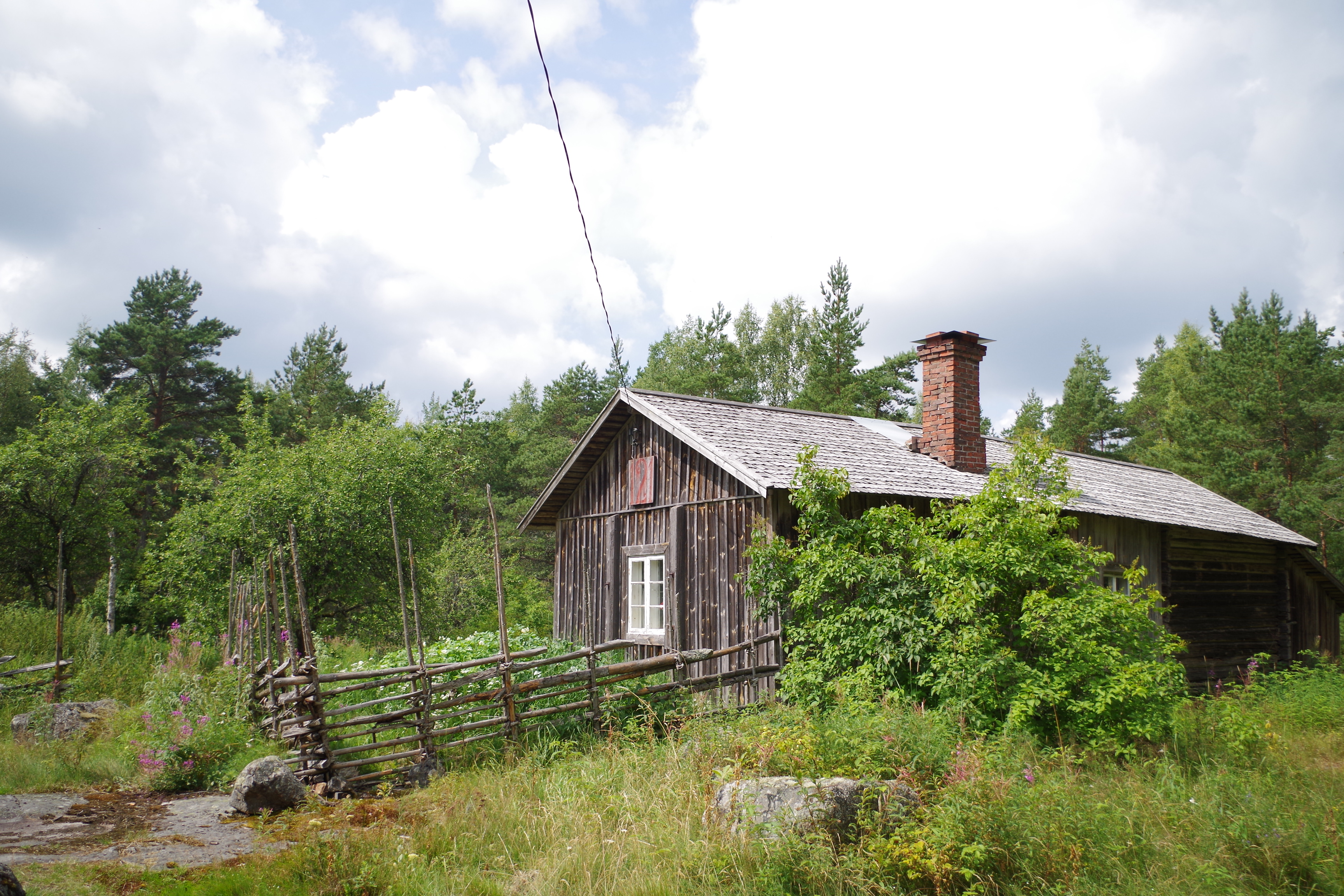 Vehmaalla sijaitseva museoitu ruotusotamiehen torppa.